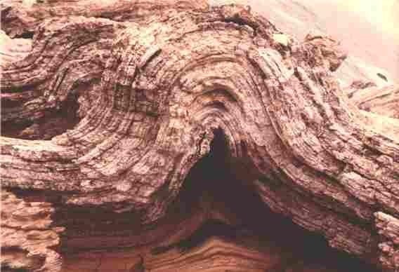 ภาพแสดงชั้นหินคดโค้งที่พบใน Monterey Formation